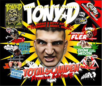 Cover des Albums „Totalschaden“ (Pappschuber der Premium Edition)